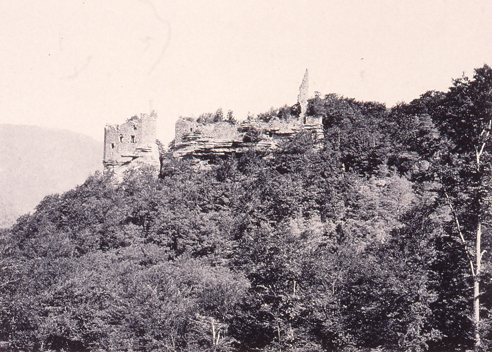 Ansicht der Burgruine Wasigenstein im Elsass